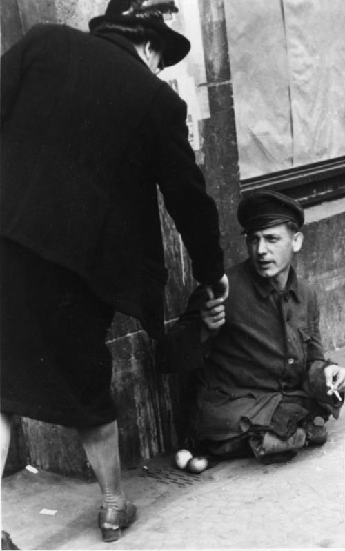 Essen, bettelnder Invalide ADN-ZB-Illus-E. Lerche Nachkriegserscheinungen: Ein Schwerkriegsbeschädigter empfängt in der Kettwigerstraße in Essen Almosen von den Leuten.